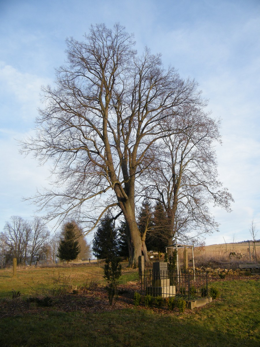 Lípa u kostela v Lipové